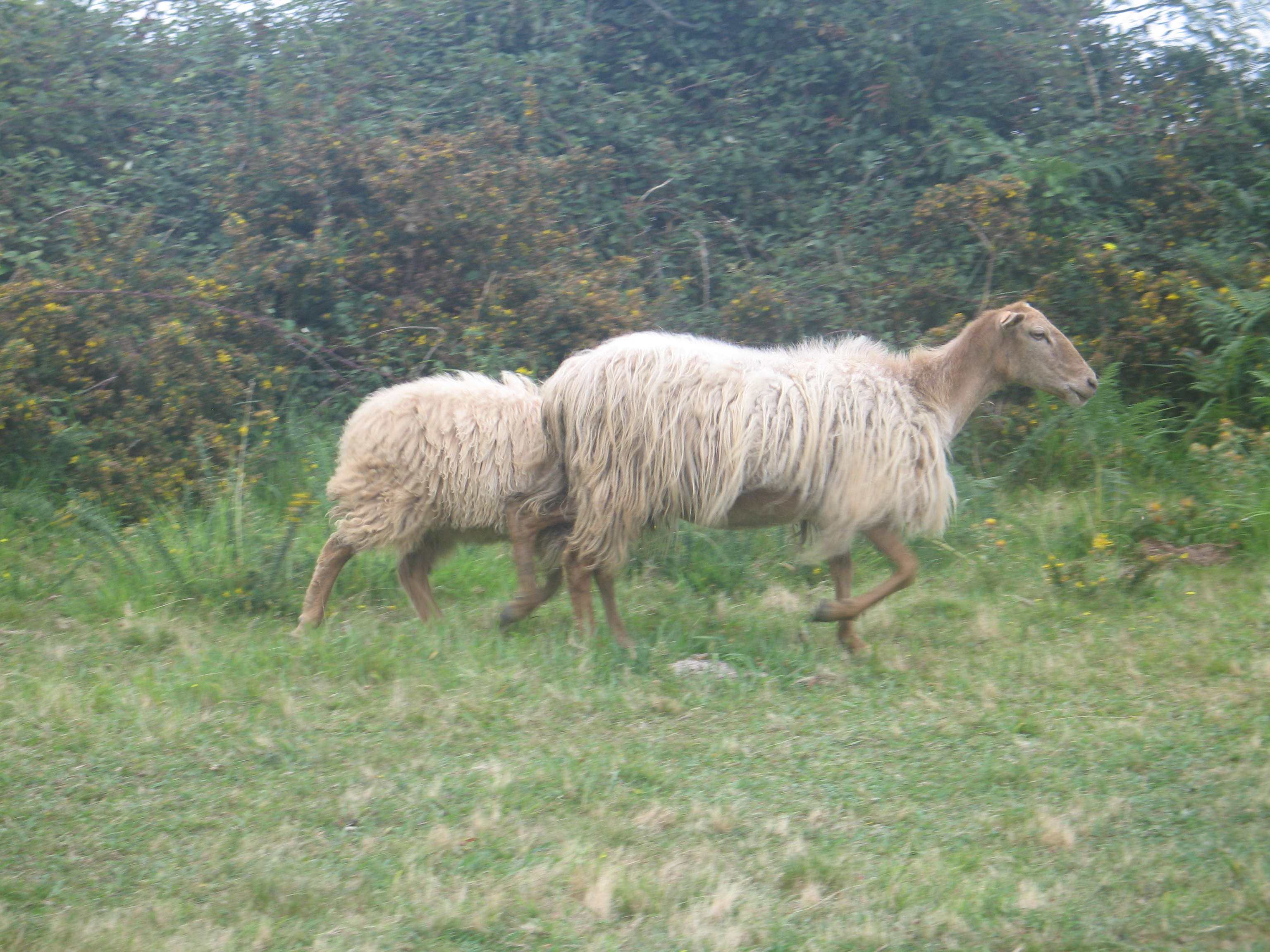 Sasardia arrazaren ezaugarri berezkoekin